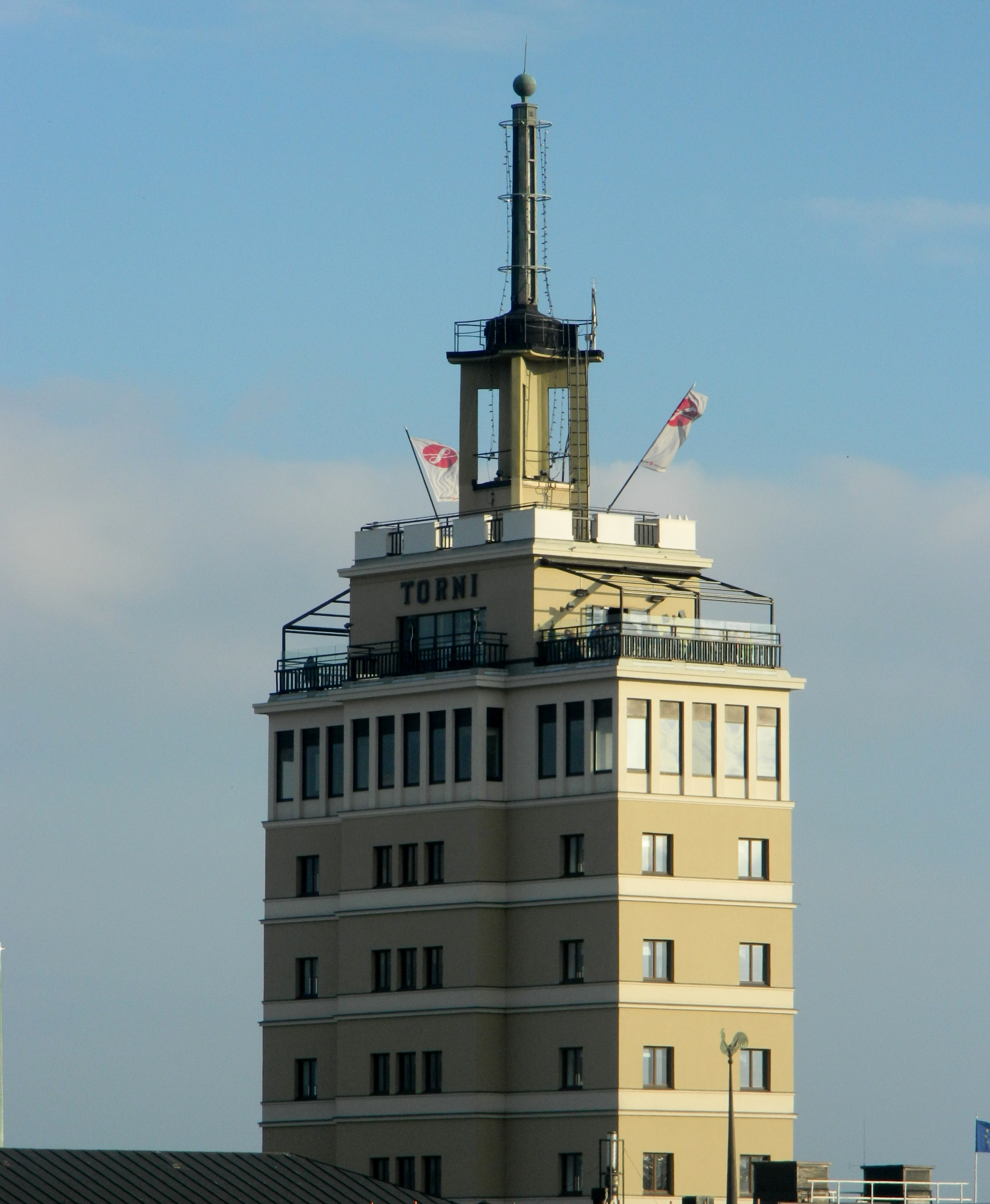 Hotelli Torni